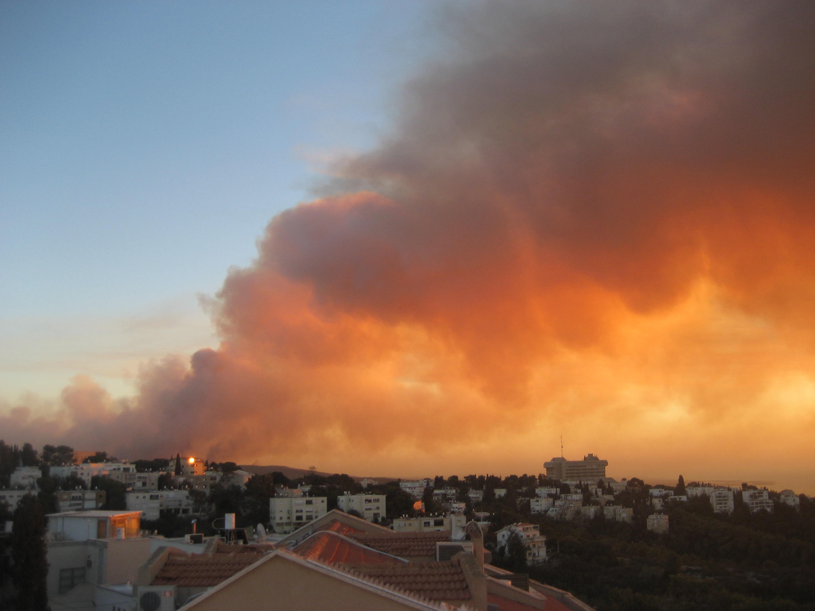 פארק הכרמל הוא כינוי לרצף של גנים לאומיים ושמורות טבע על הר הכרמל הגבוה, המשתרע מגבולותיהן הדרומיים של הערים חיפה ונשר בצפון, ועד אזור נחל מערות ועמק מהר"ל בדרום; שלושה יישובים על רכס הכרמל מהווים מובלעות בתוך רצף שטחי הפארק - עספיא, דלית אל כרמל ובית אורן. גודל הפארק המקורי היה 101,590 דונם, מתוכם 63,950 דונם שהוגדרו כ-"גן לאומי" ו-37,640 דונם הוגדרו כ"שמורת טבע". שטח השמורות משולב בתוך פארק הכרמל כאשר שטחי הגן הלאומי מקיפים את השמורות ויוצרים רצף של שטחים ירוקים.